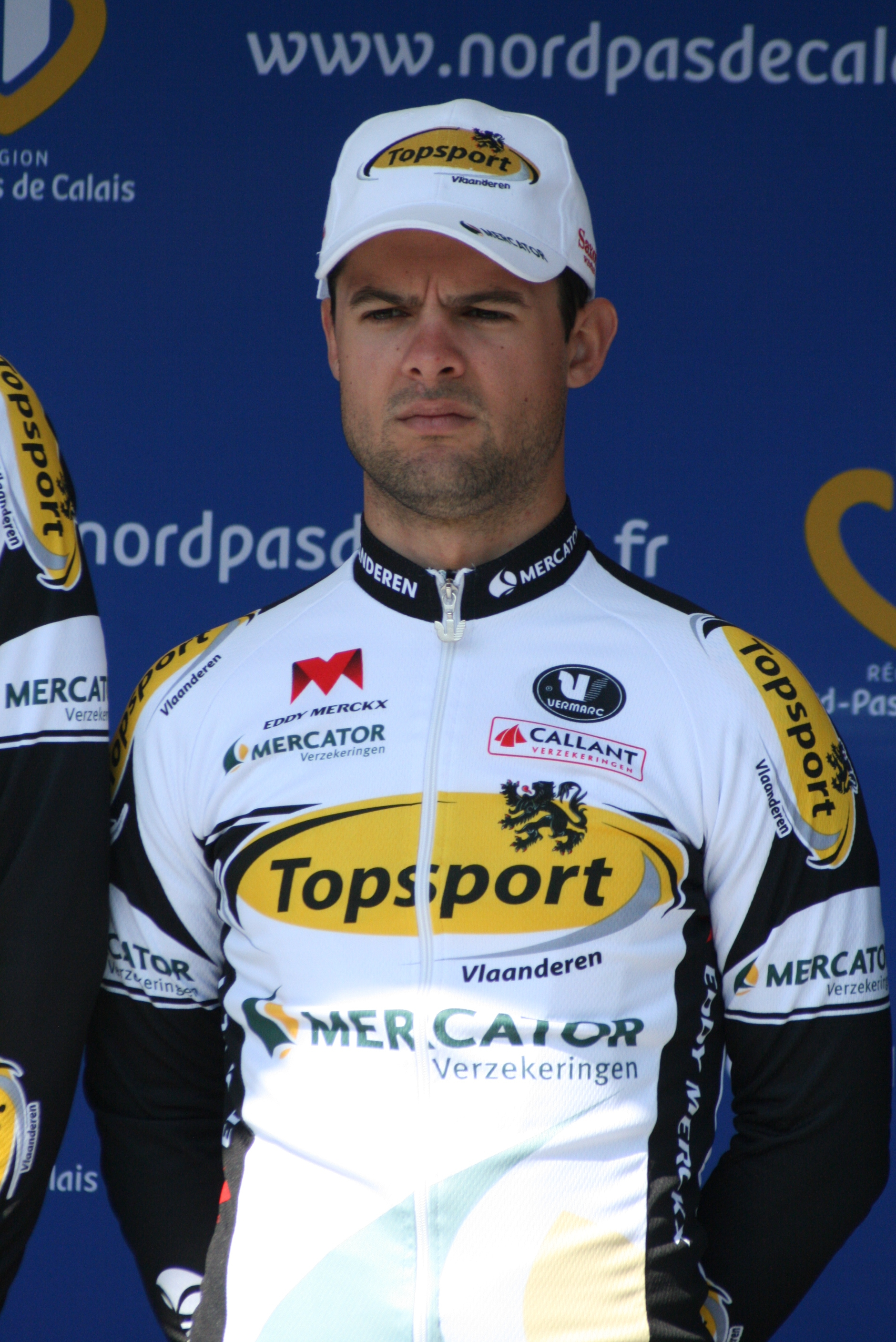 Présentation des coureurs au départ de la première étape Gregory Joseph